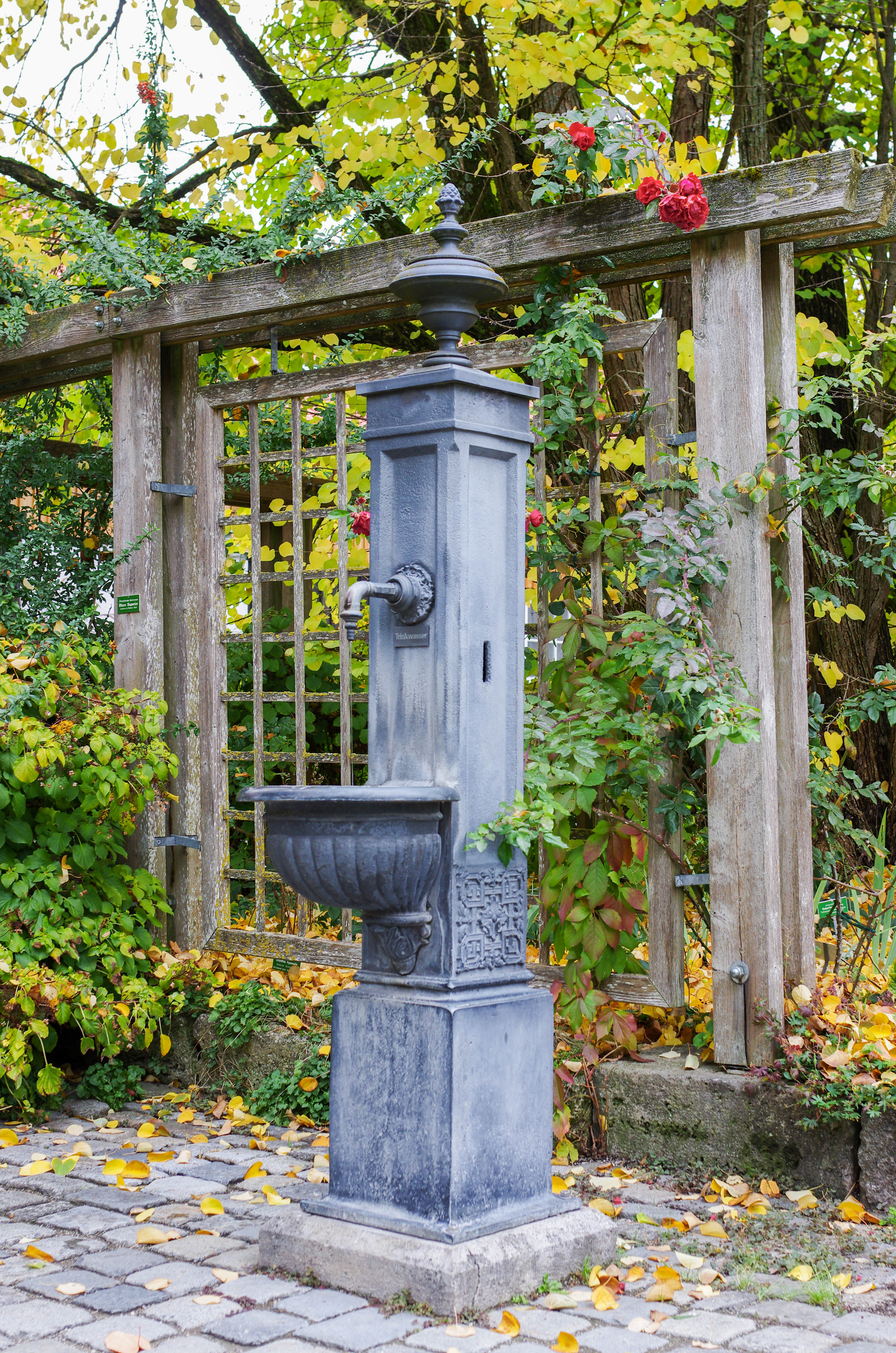 Gesamtansicht des gusseisernen Brunnens von SWThis is a photograph of an architectural monument.